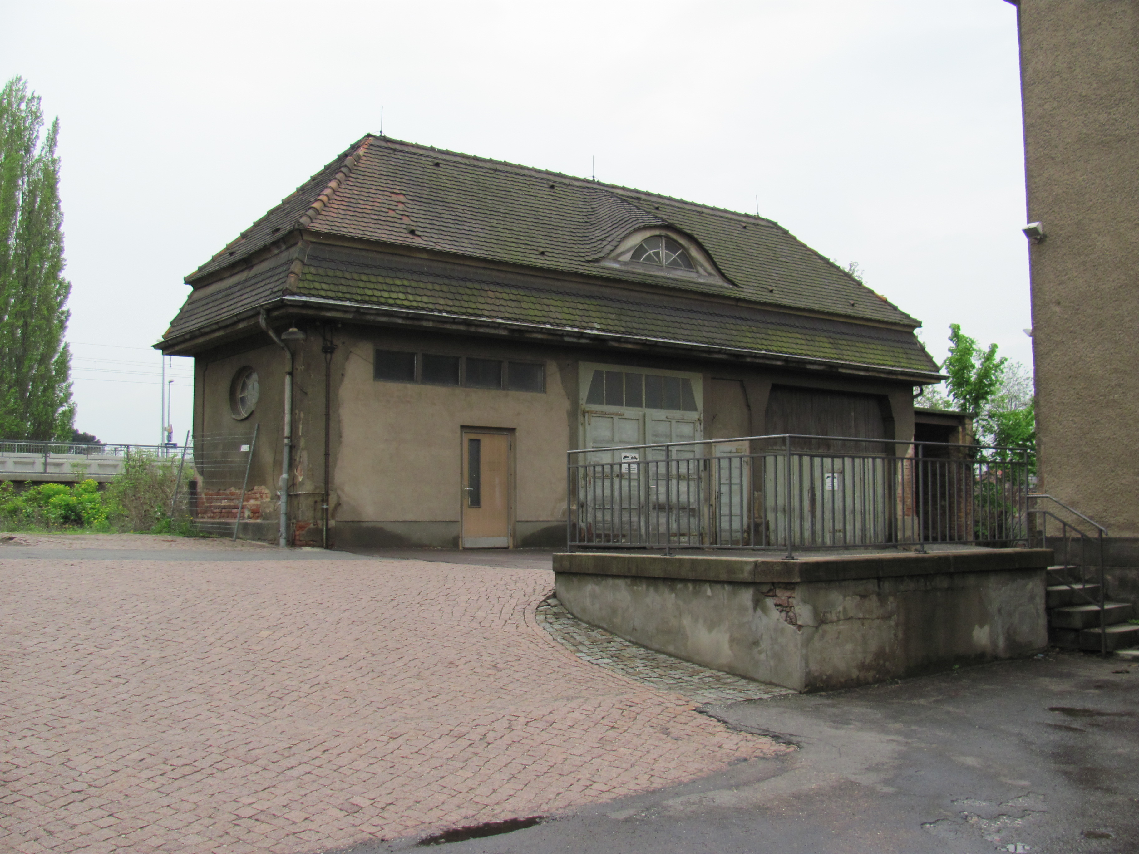 Radebeul, Kötzschenbrodaer Postamt, Hintergebäude